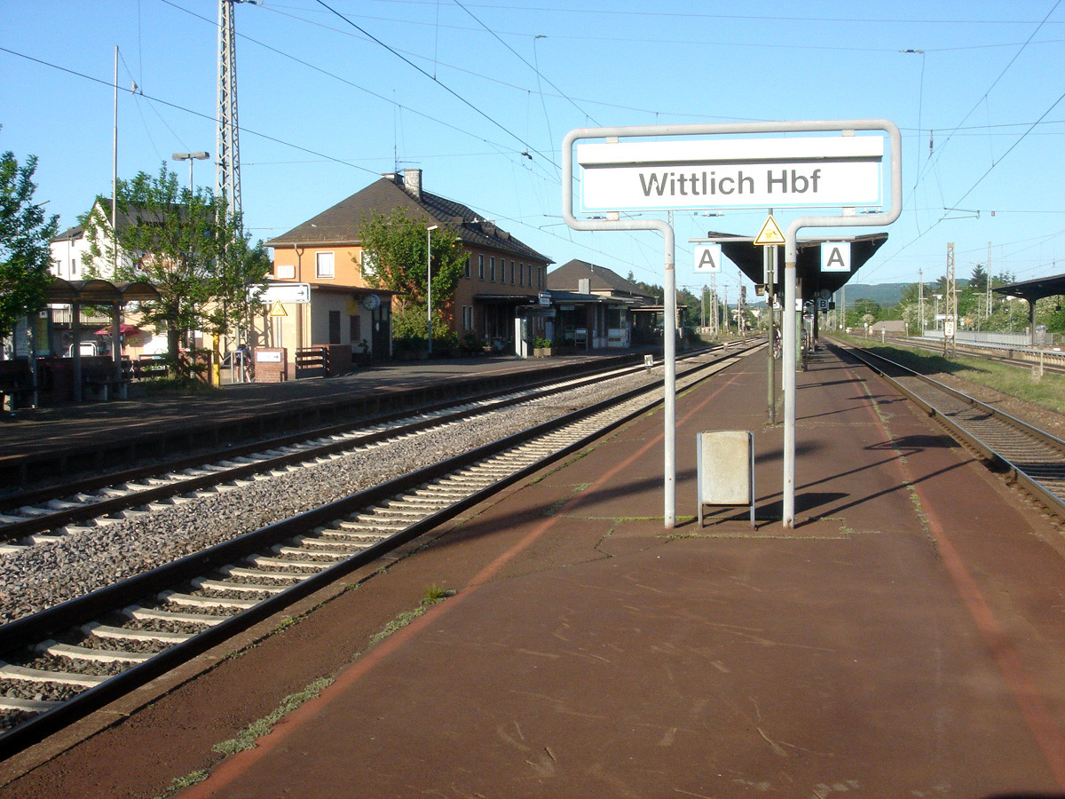 Wittlich Hbf